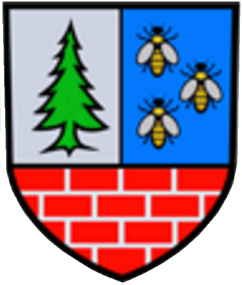 Die Wiederverleihung des Gemeindewappens erfolgte mit Wirkung vom 25. Jänner 2016